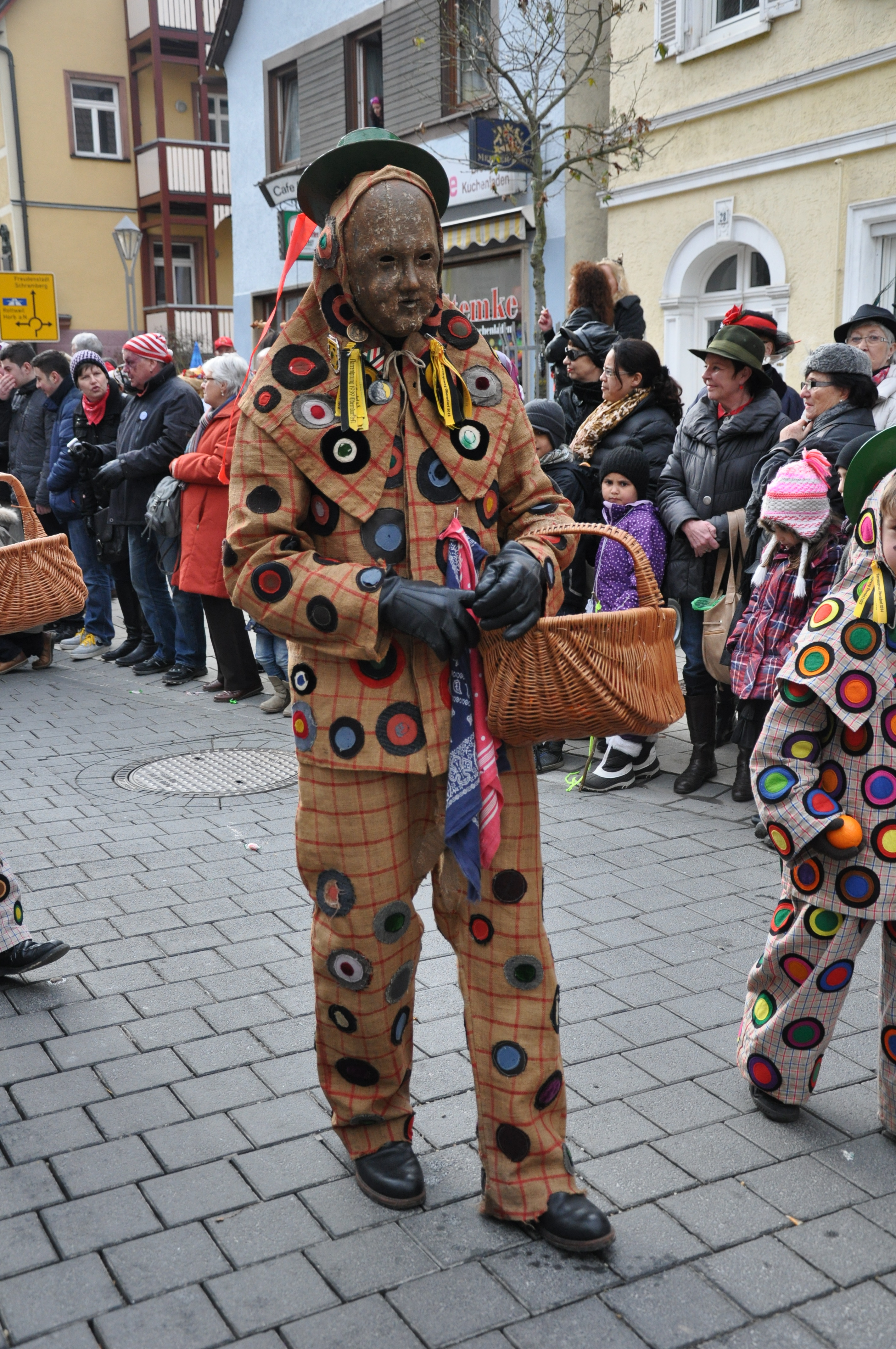 Oberndorf am Neckar, Narrensprung am Fasnetsdienstag nachmittag 2014, Schantle (Drecklärvle)